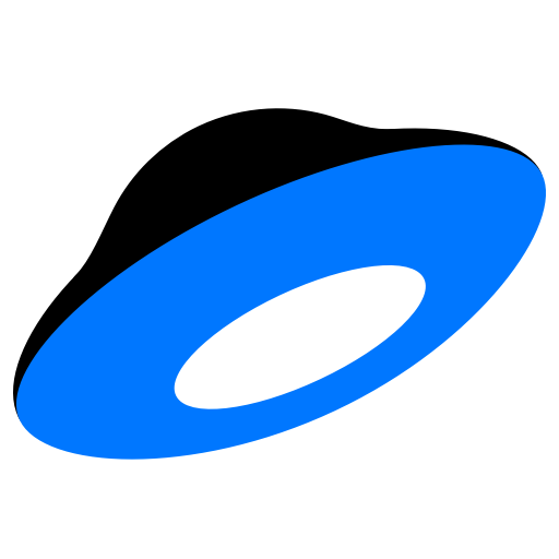 Обновленный логотип сервиса Яндекс.Диск, который стал таким в 2015 году.